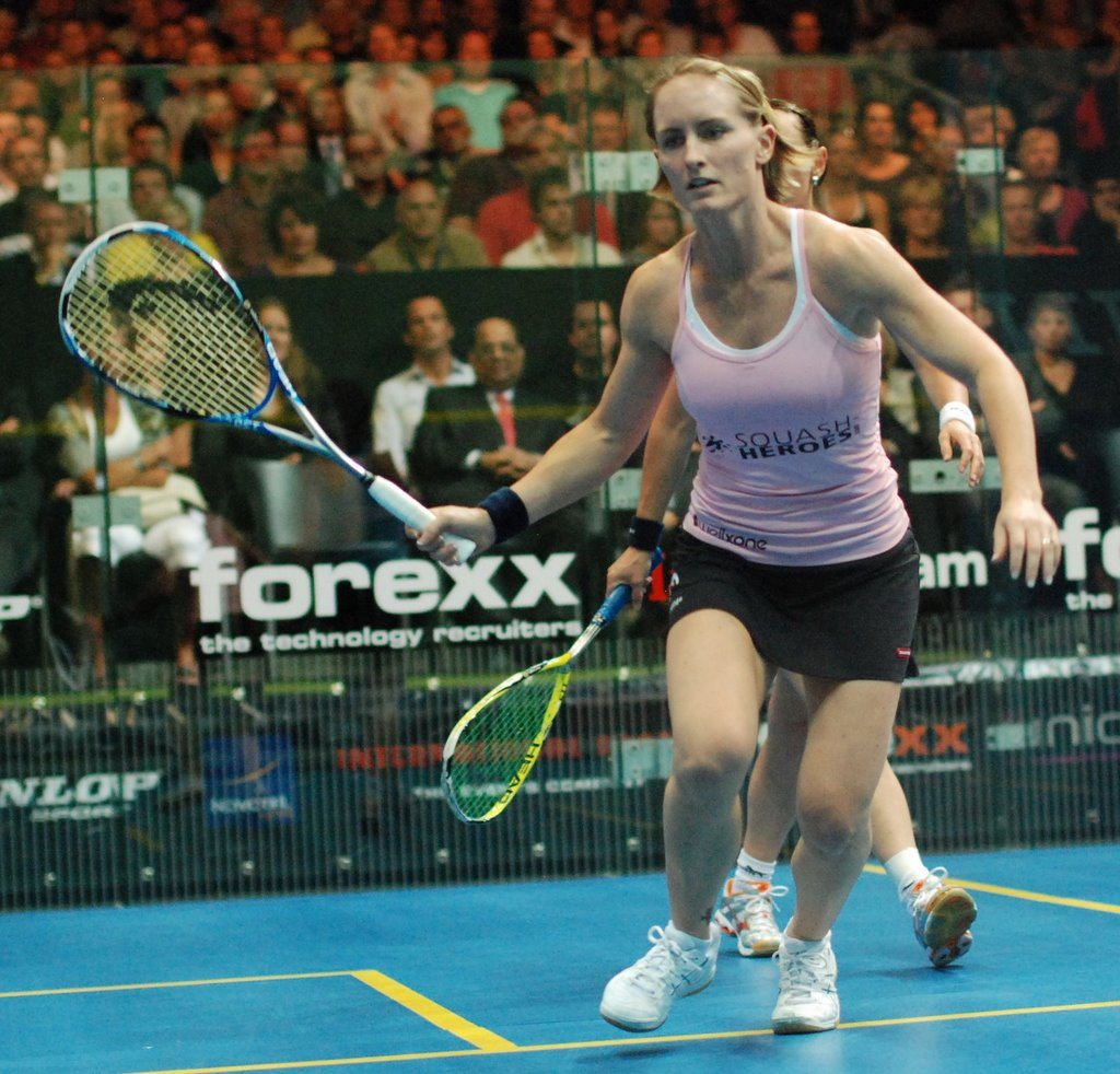 Natalie Grinham